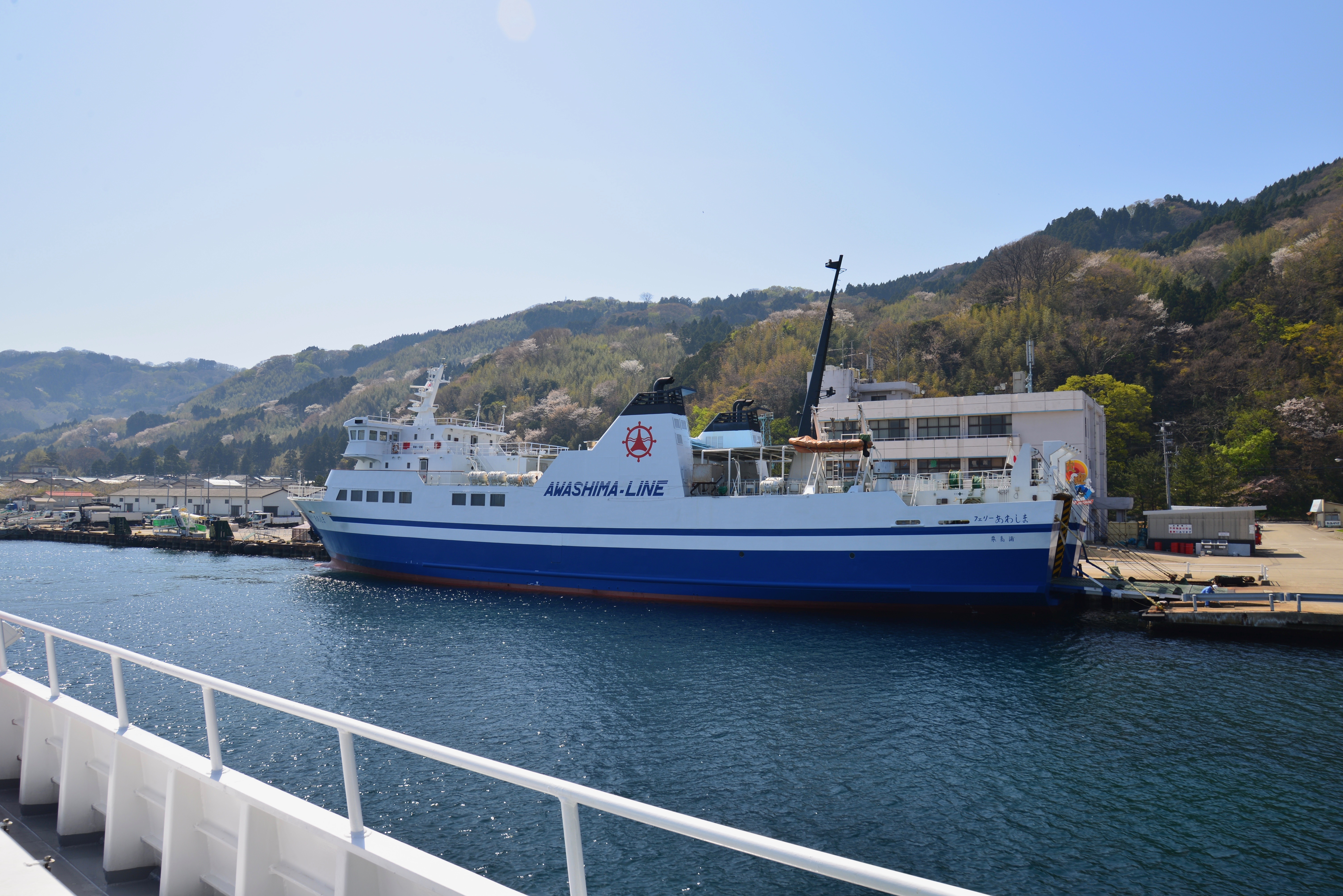 内浦港に停泊するフェリーあわしま